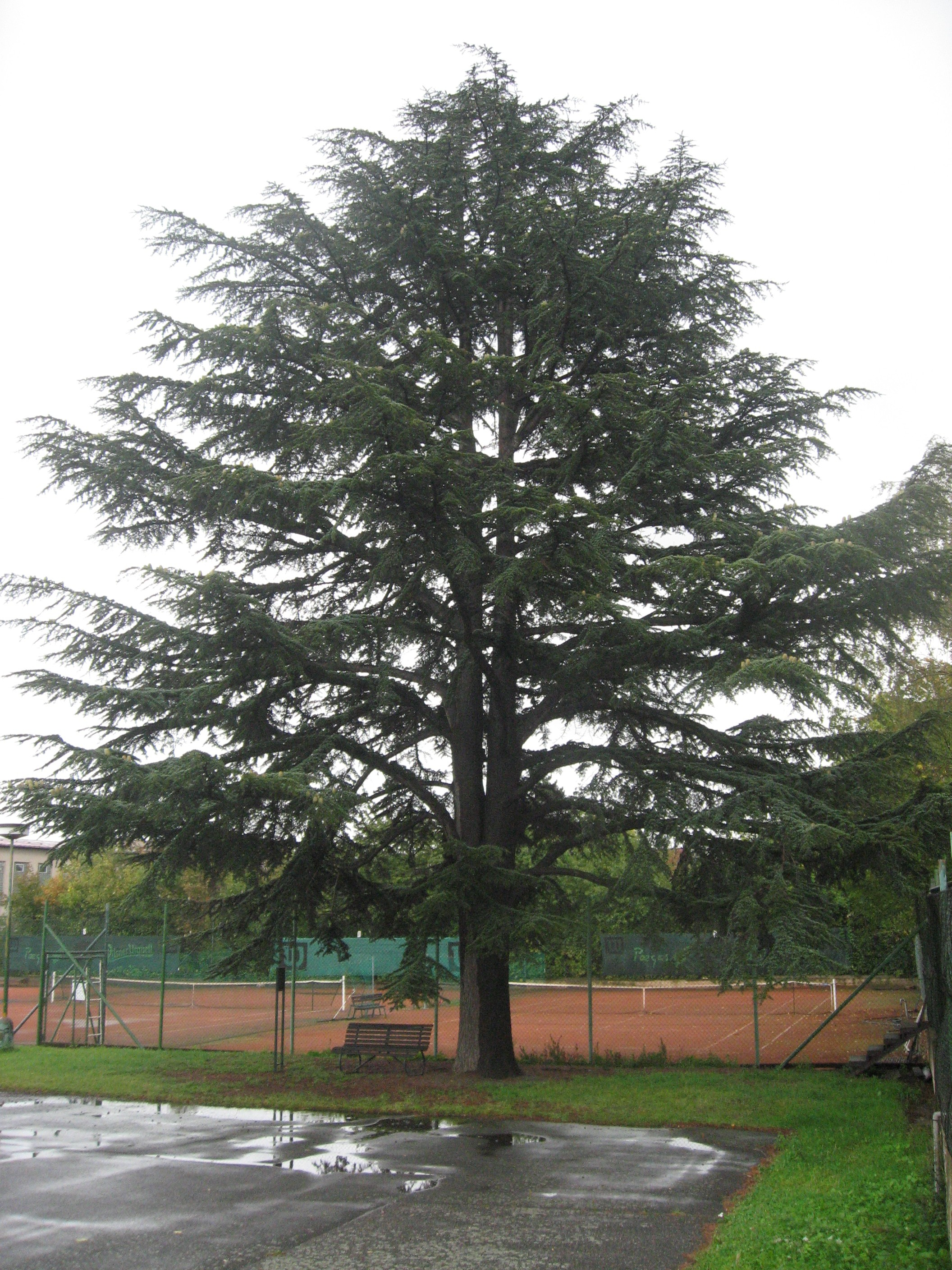 Cedr Na Balkáně